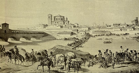 L'esercito austriaco passa il Ticino a Pavia il 20 marzo 1849